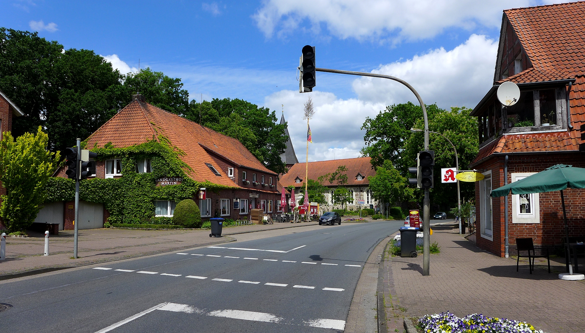 Hauptstraße in Selsingen mit der St.-Lamberti-Kirche im Bildhintergrund. Aufnahmedatum 2015-06.